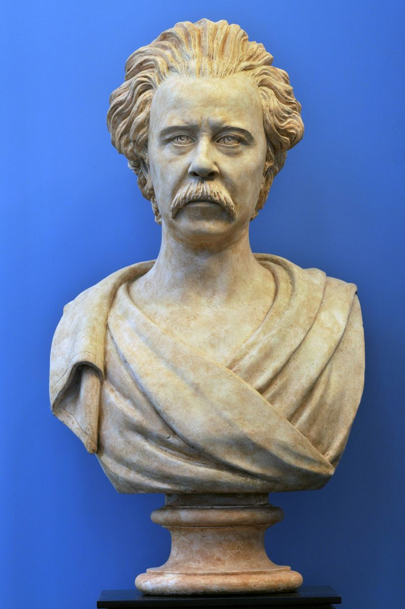 Busto Filopanti